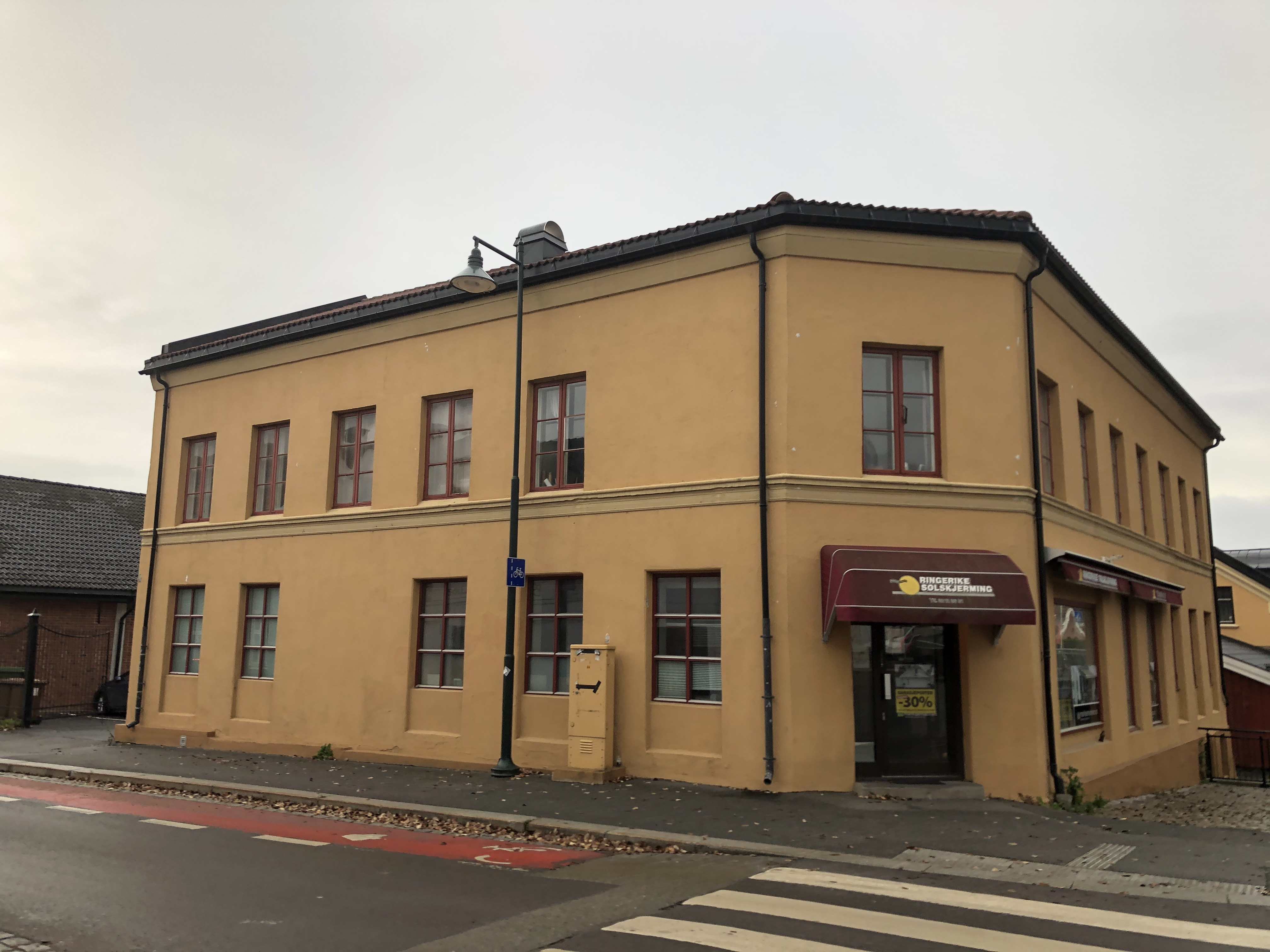 Strandgata 1, Hønefoss